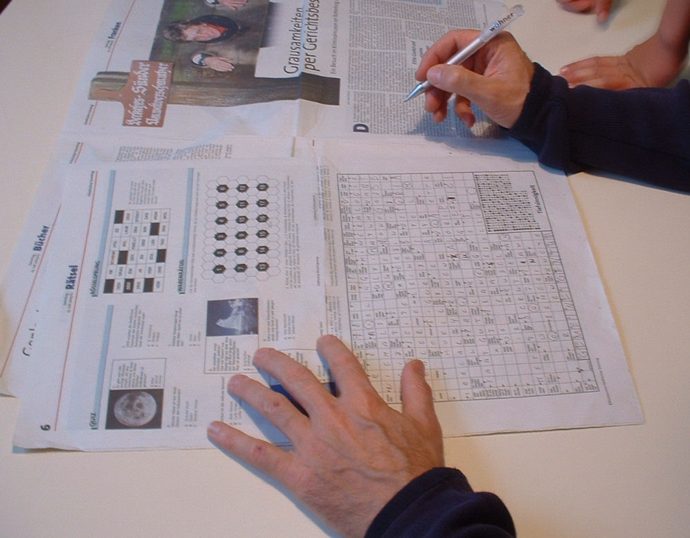 crossword puzzle